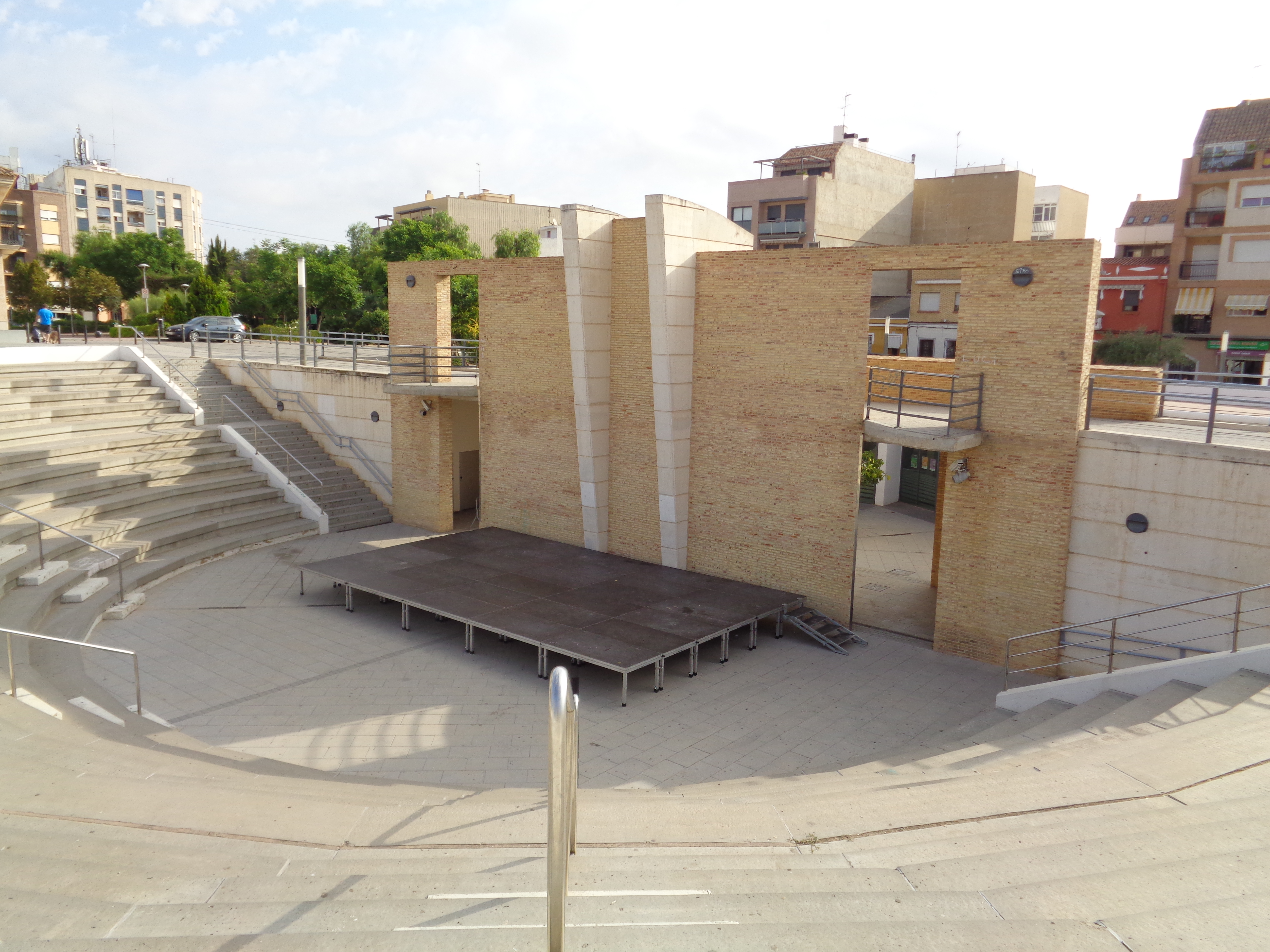 Espai Cultural La Cova Gran.